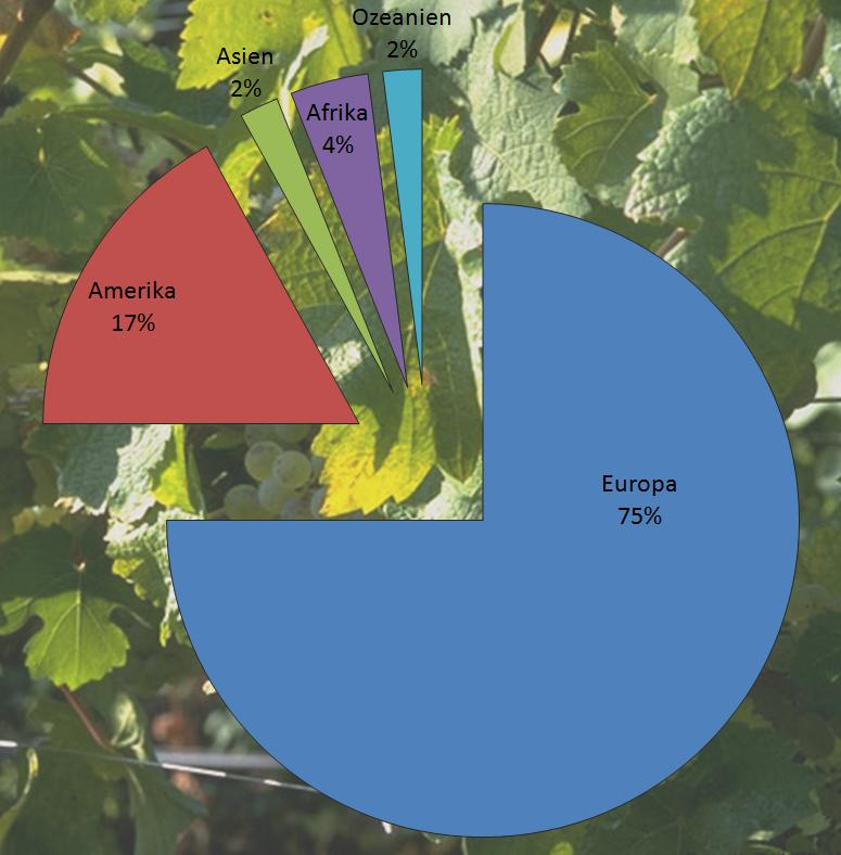 Abb. zeigt die Verteilung der Weltweinbaufläche auf die Kontinente